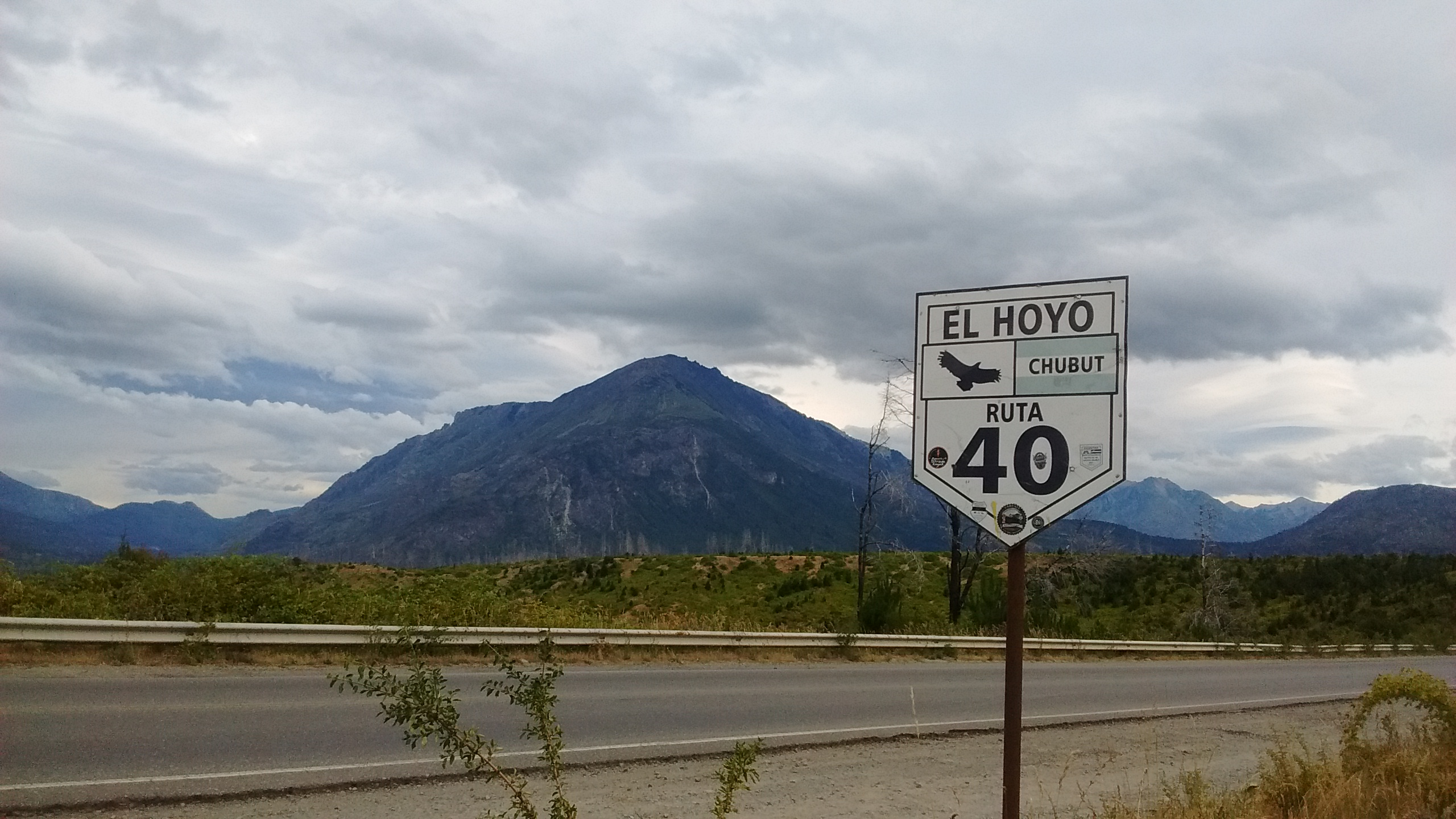 Cerro Pirque desde Ruta 40, El Hoyo, Chubut